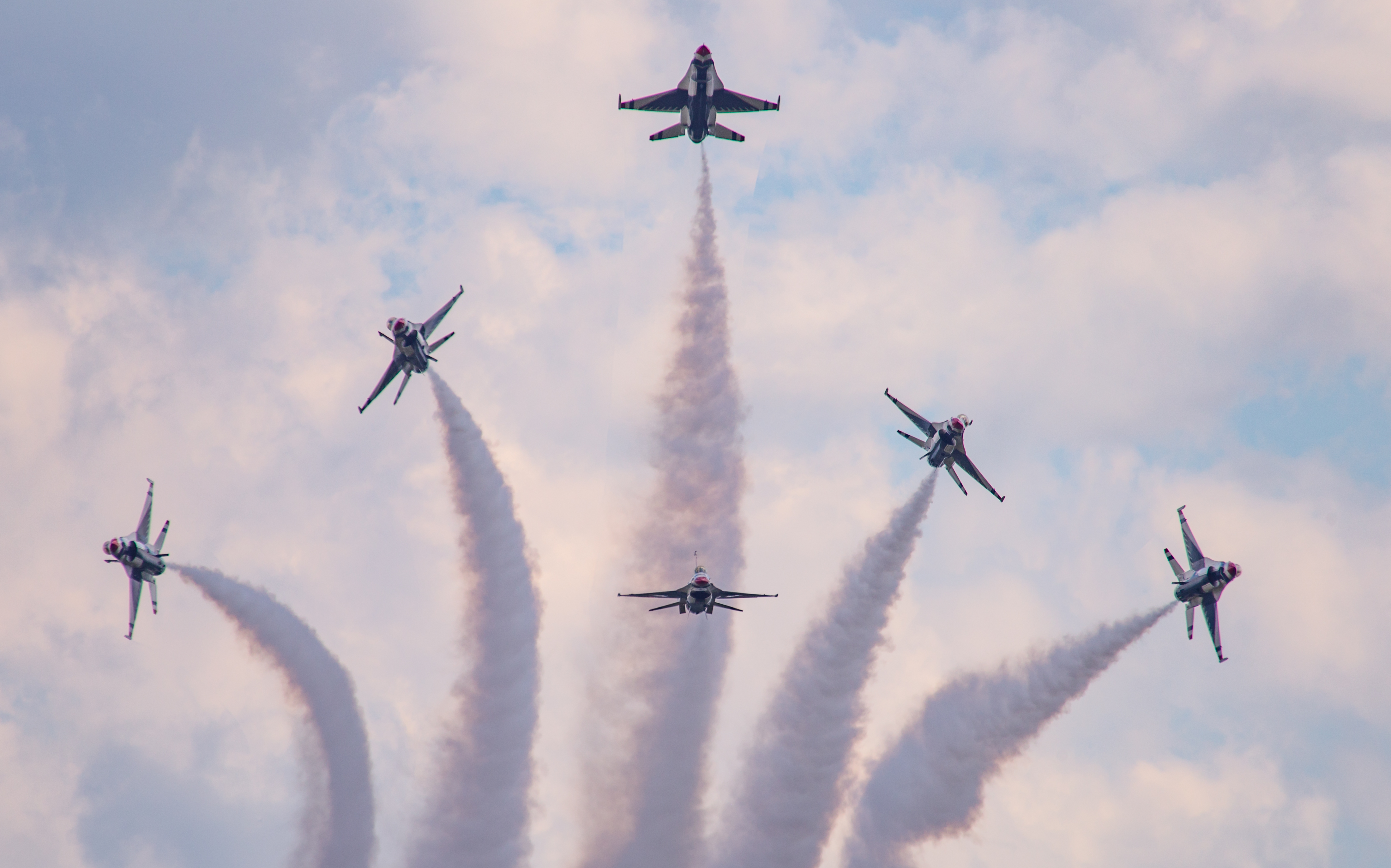 Wings Over Pittsburgh